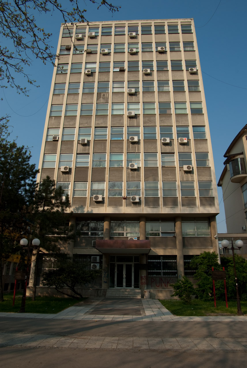 Rektorat UNS